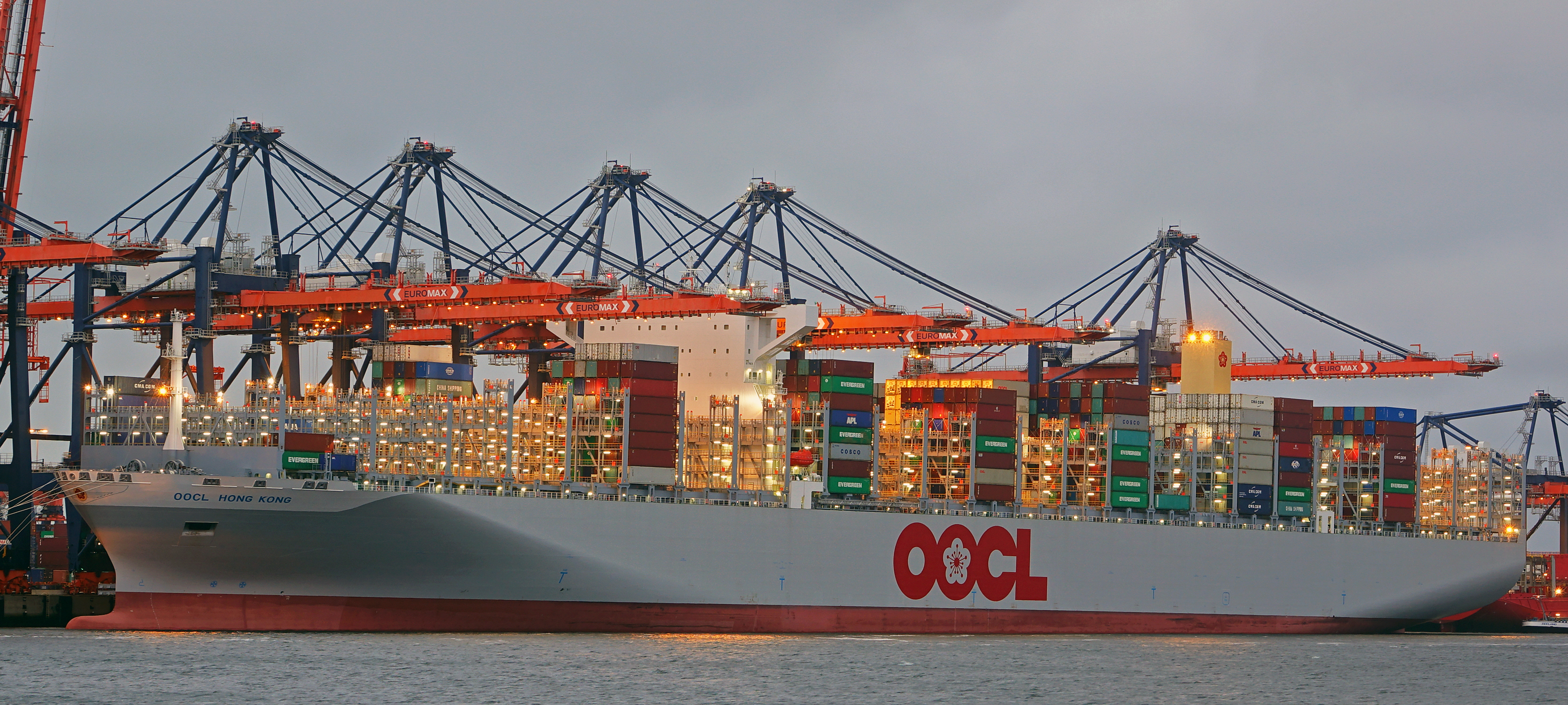 Euromax terminals Yangtzehaven 24-6-2017 , grootste containerschip (21.413 TEU) ter wereld voor de eerste keer in Rotterdam